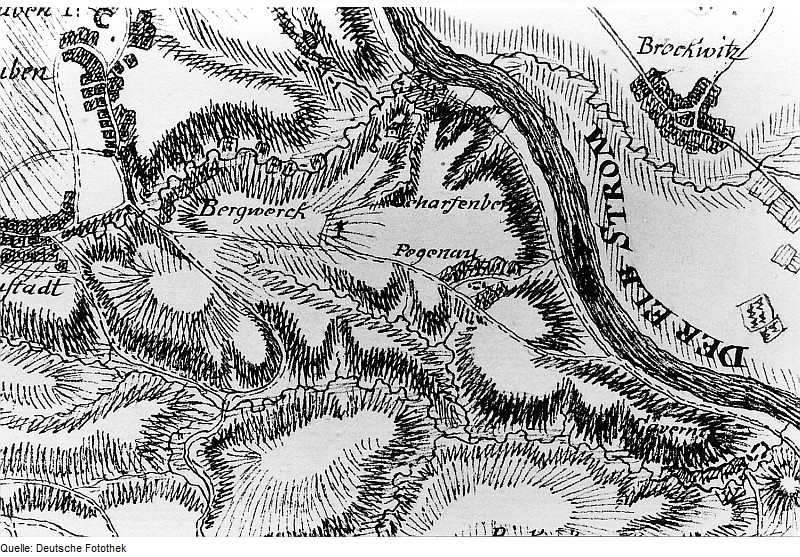 Original image description from the Deutsche Fotothek Klipphausen-Scharfenberg. Karte von einem Teil des Kurfürstentums Sachsen, Petri, nach 1759 (Sign.: VII 63)